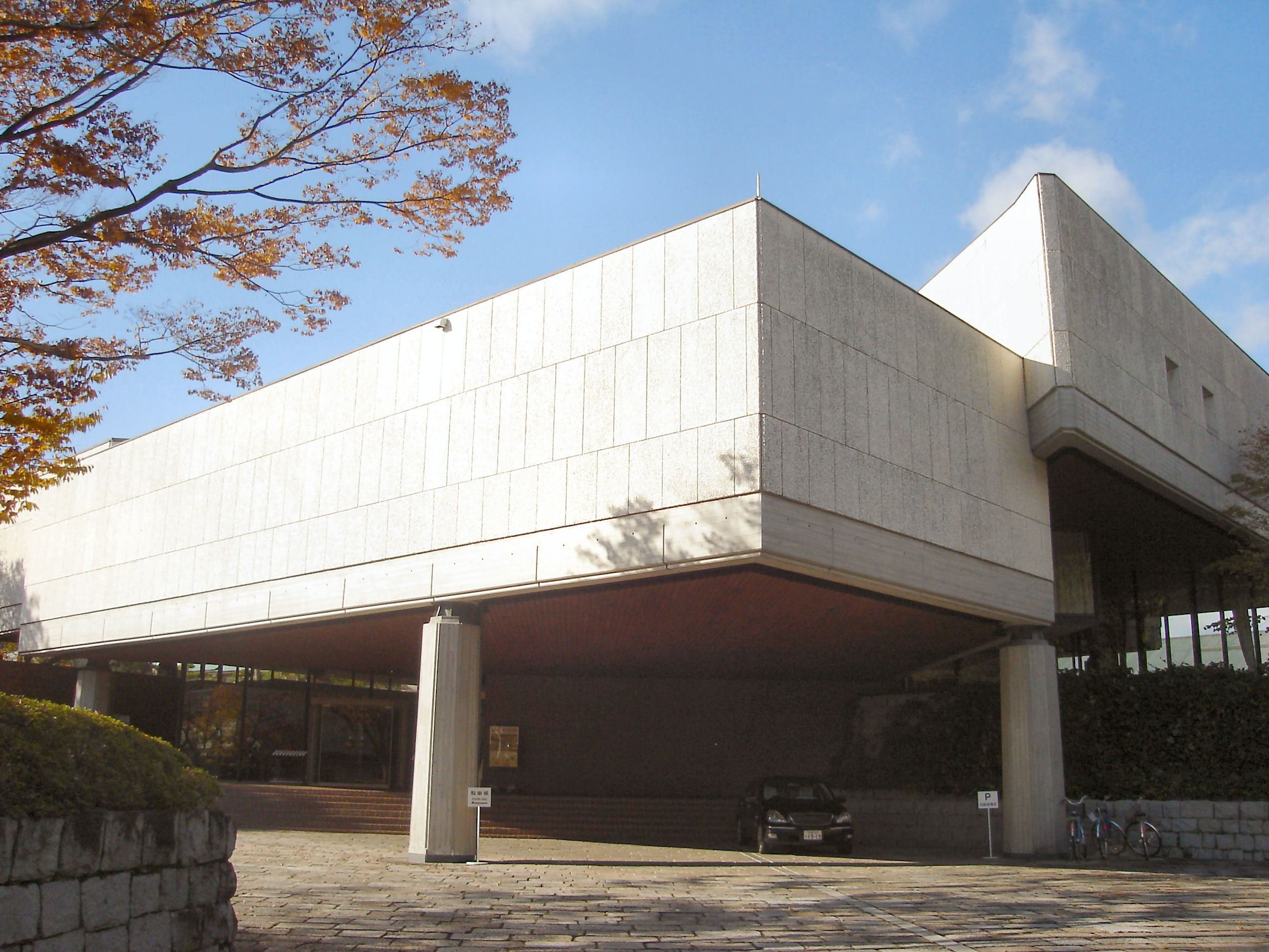 Sen-oku hakko kan (Museum of Sumitomo Collection), kyoto japan